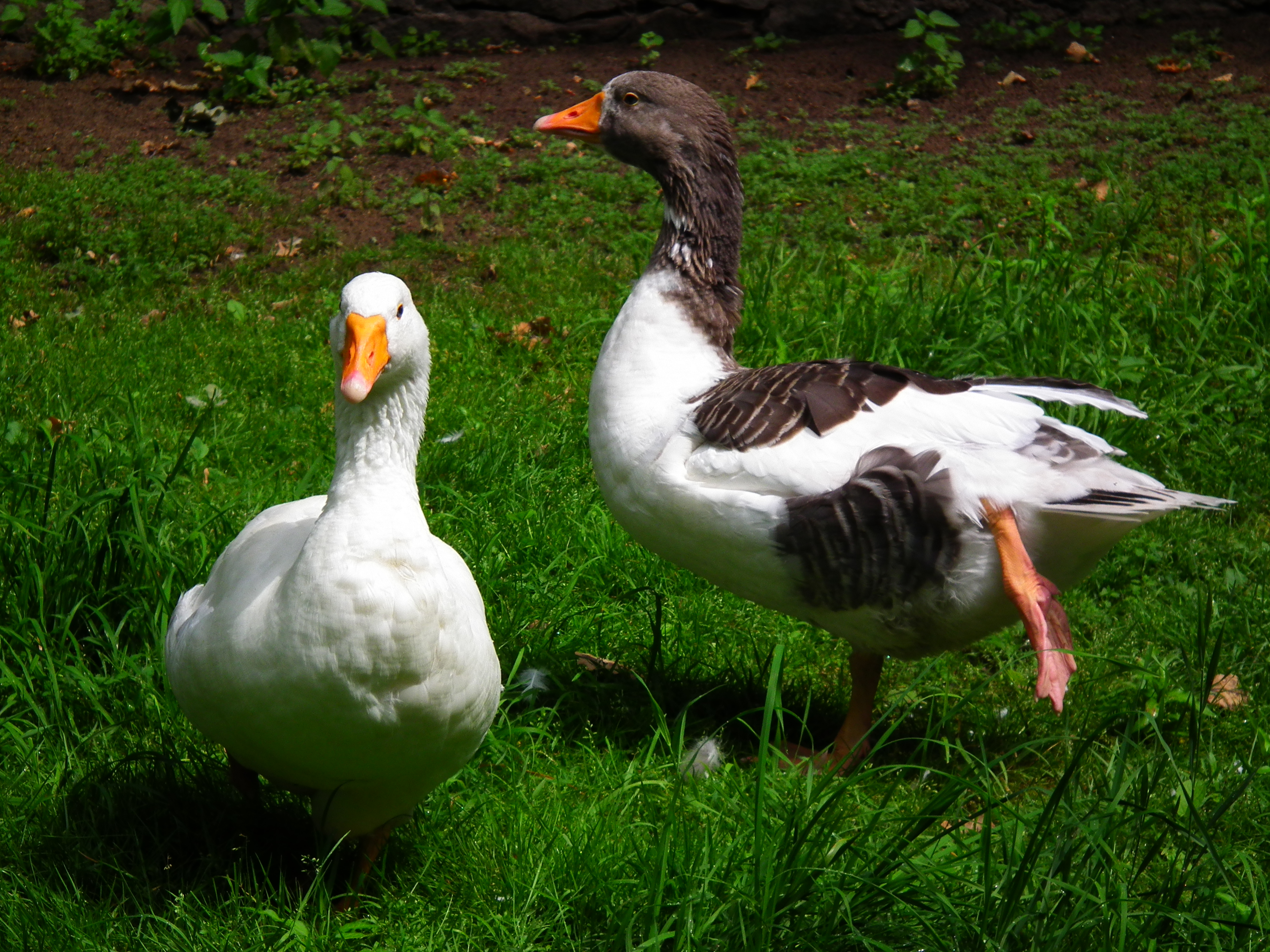 Leinegans, aufgenommem im Wildpark Alte Fasanerie in Klein-Auheim (Hessen, Deutschland)